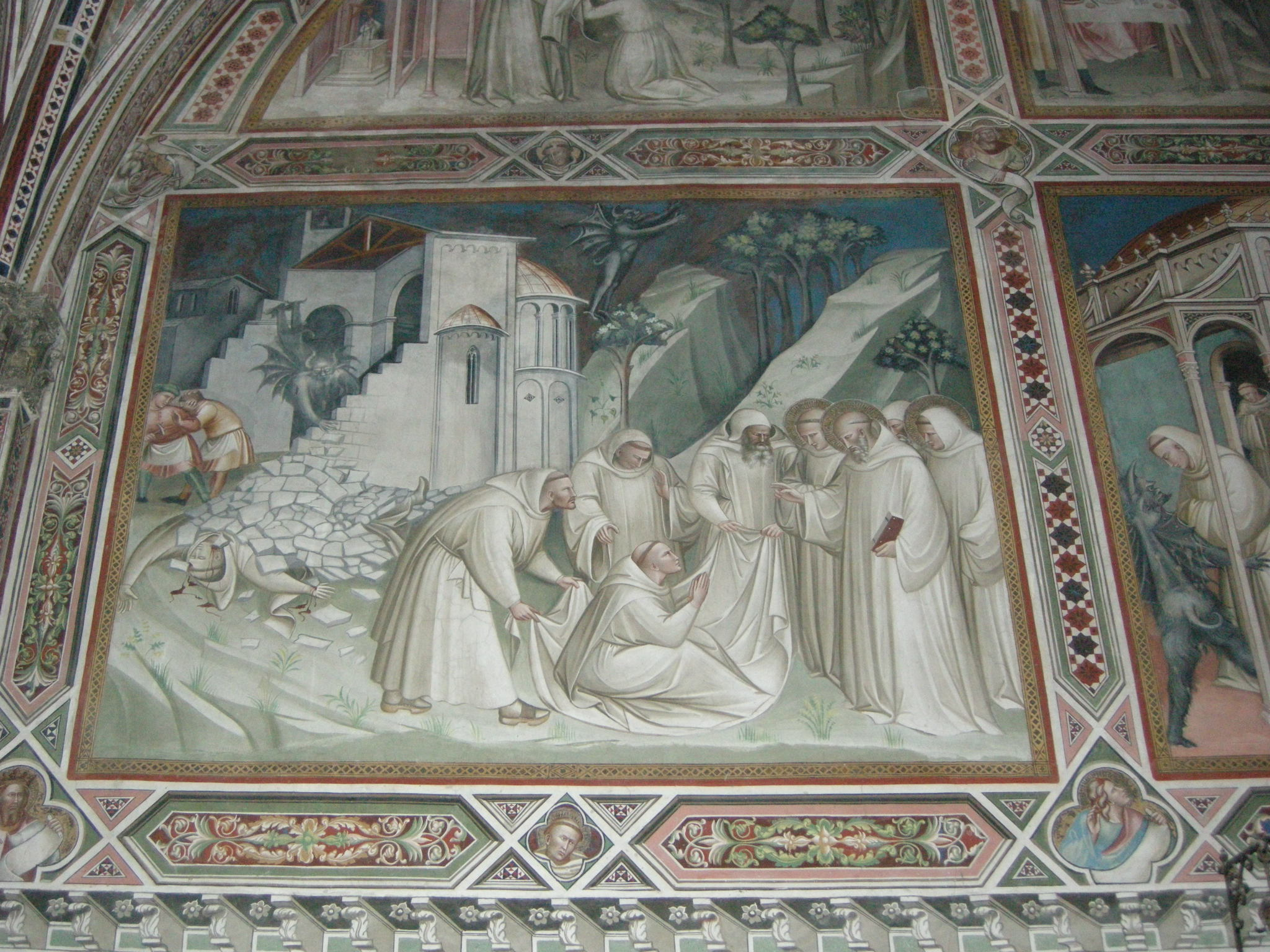 Spinello aretino, storie di san benedetto, episodio 09, Benedetto resuscita un monaco, morto per il crollo del monastero